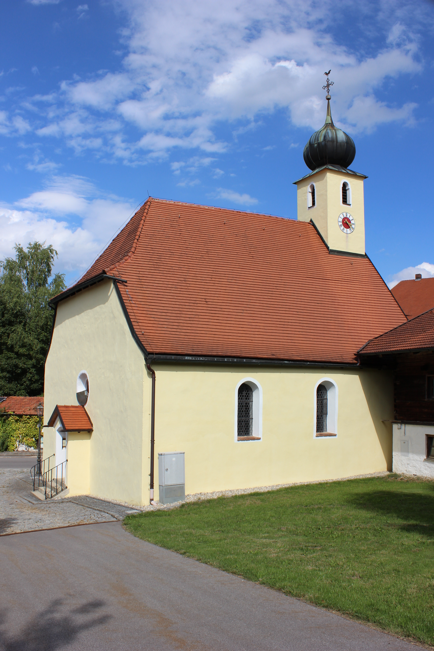 Rückwärtige Ansicht der Katholischen Filialkirche St. Stephan in Gossersdorf 6, Gemeinde Konzell.This is a photograph of an architectural monument.